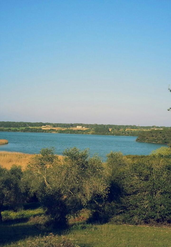 Paesaggio laghi Alimini